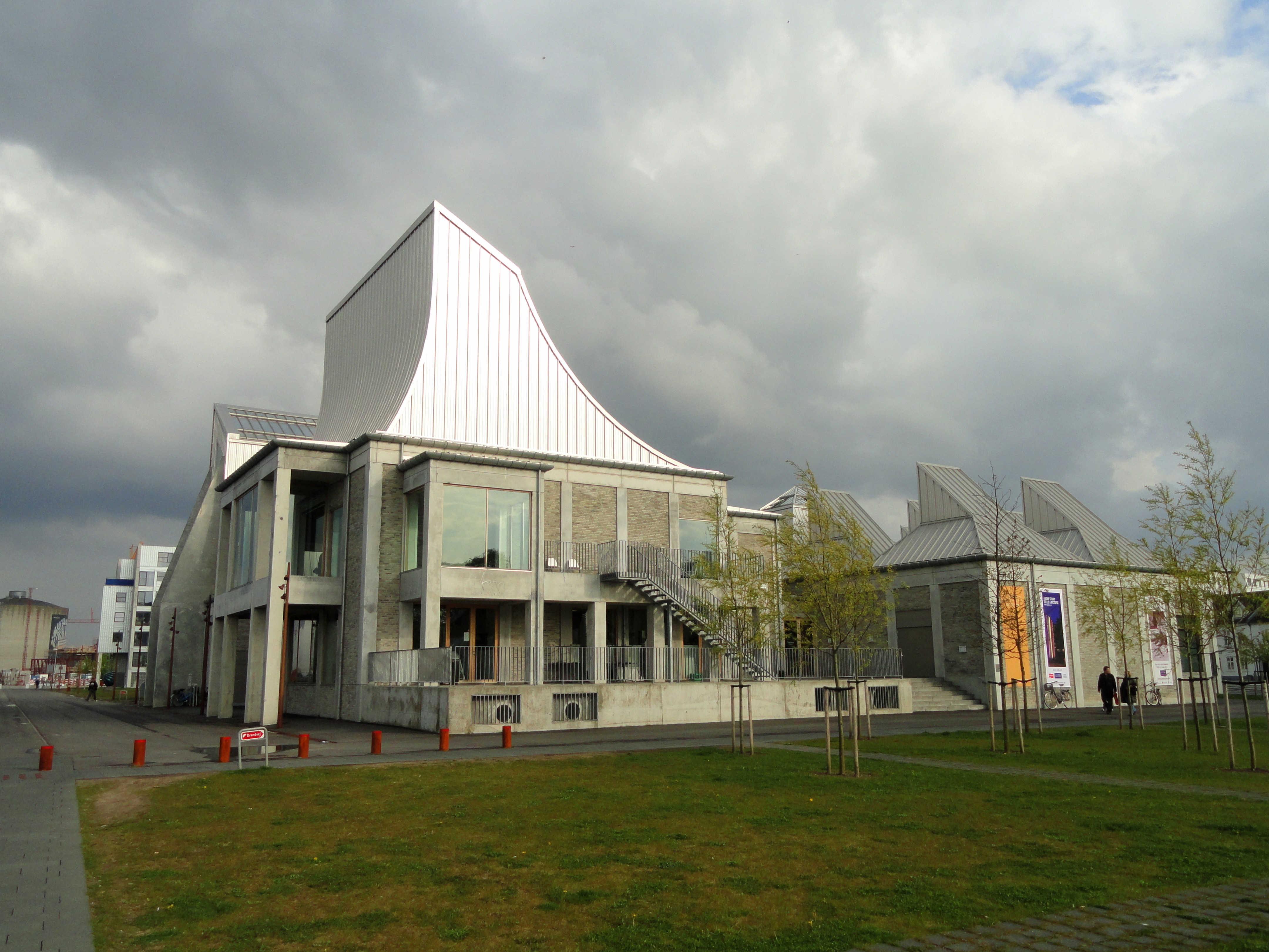 Buildings in Aalborg, Denmark.